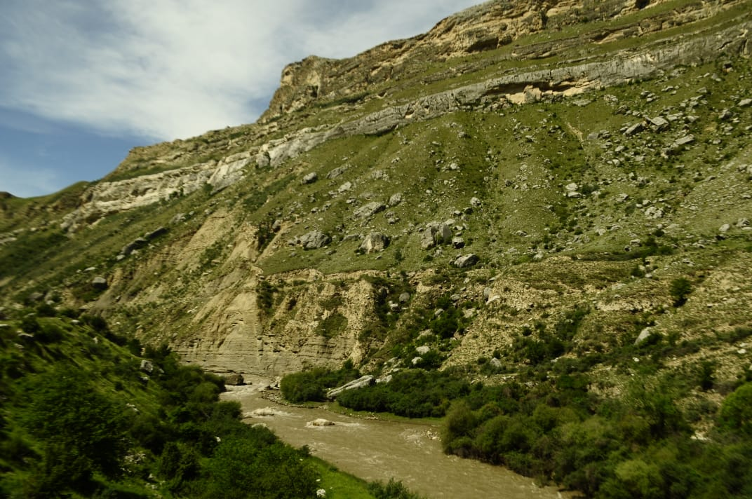 между сёлами Ташкапур и Буртанимахи